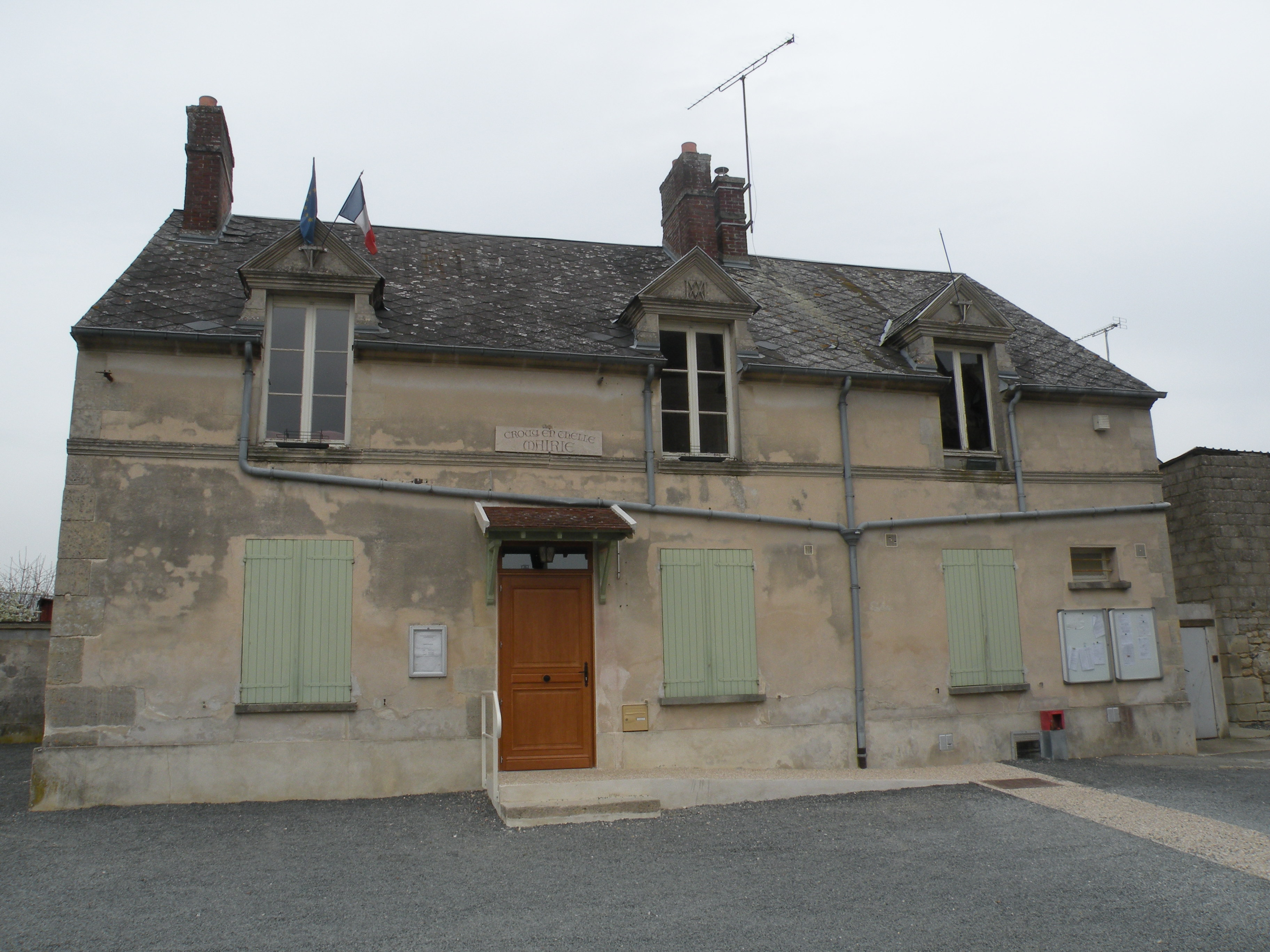 Crouy-en-Thelle mairie